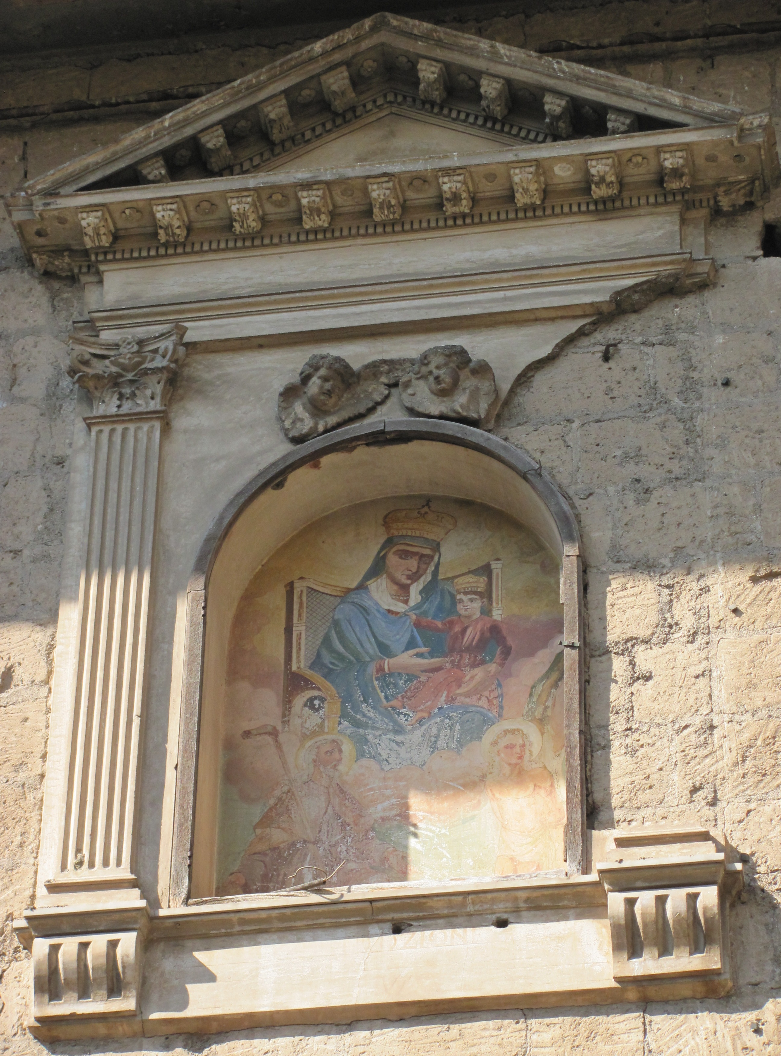 Edicola votiva, SIANO (SALERNO)